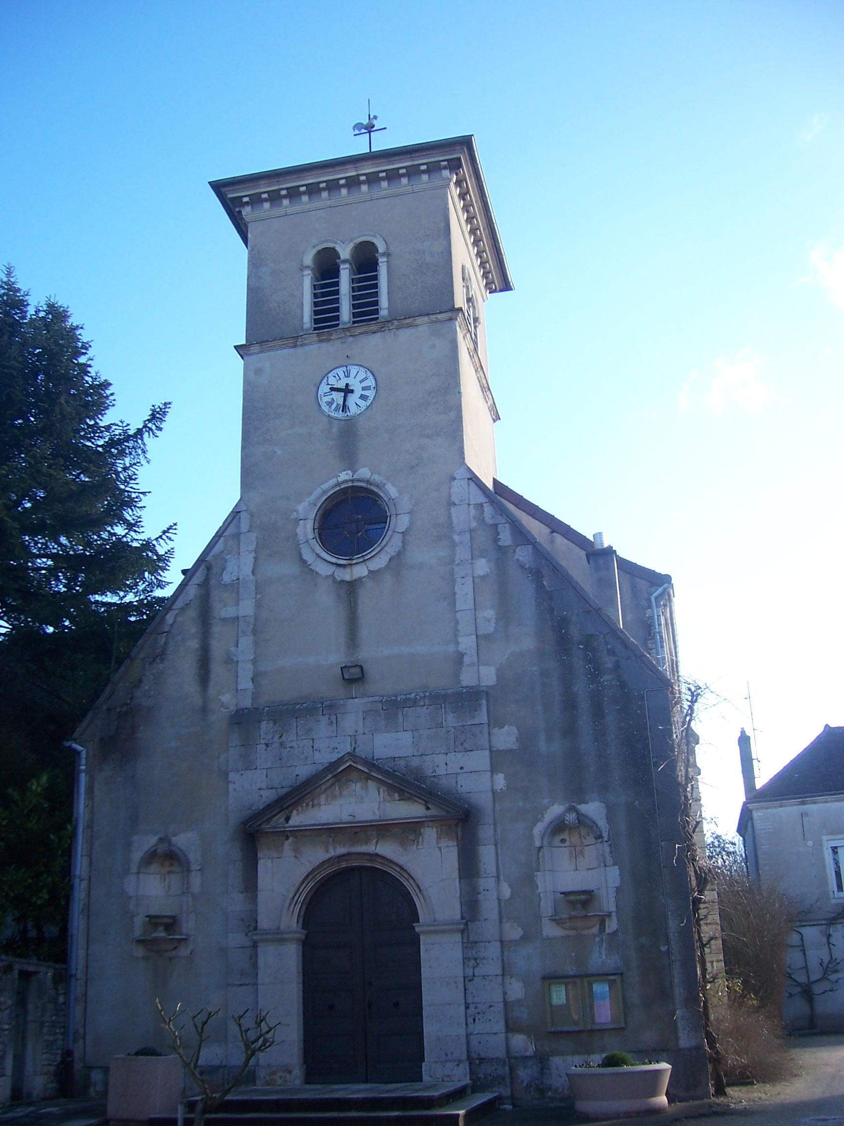 Saint-Remy Eglise